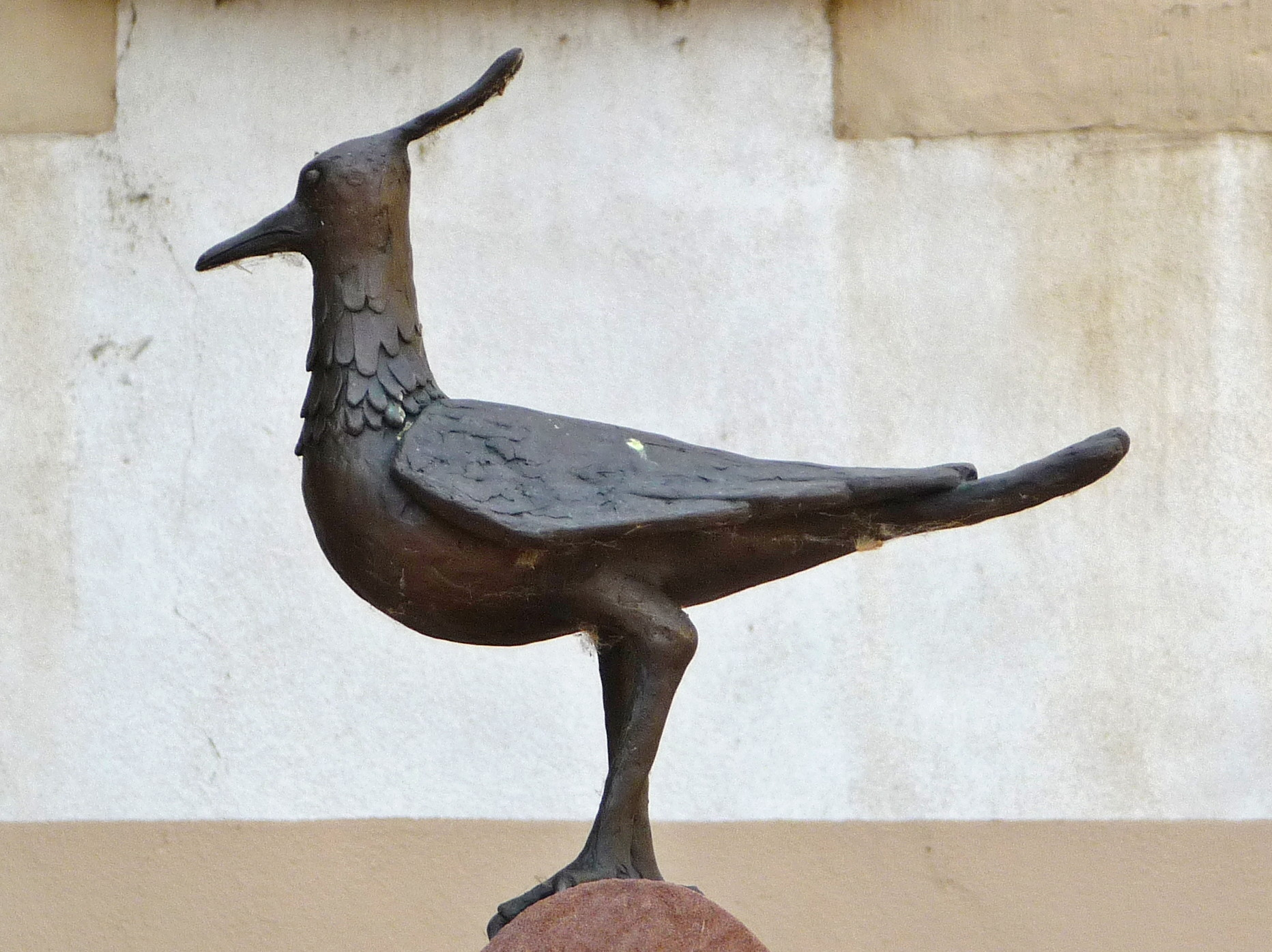 Kiebitz (Giwick) als Symbol von Erpolzheim